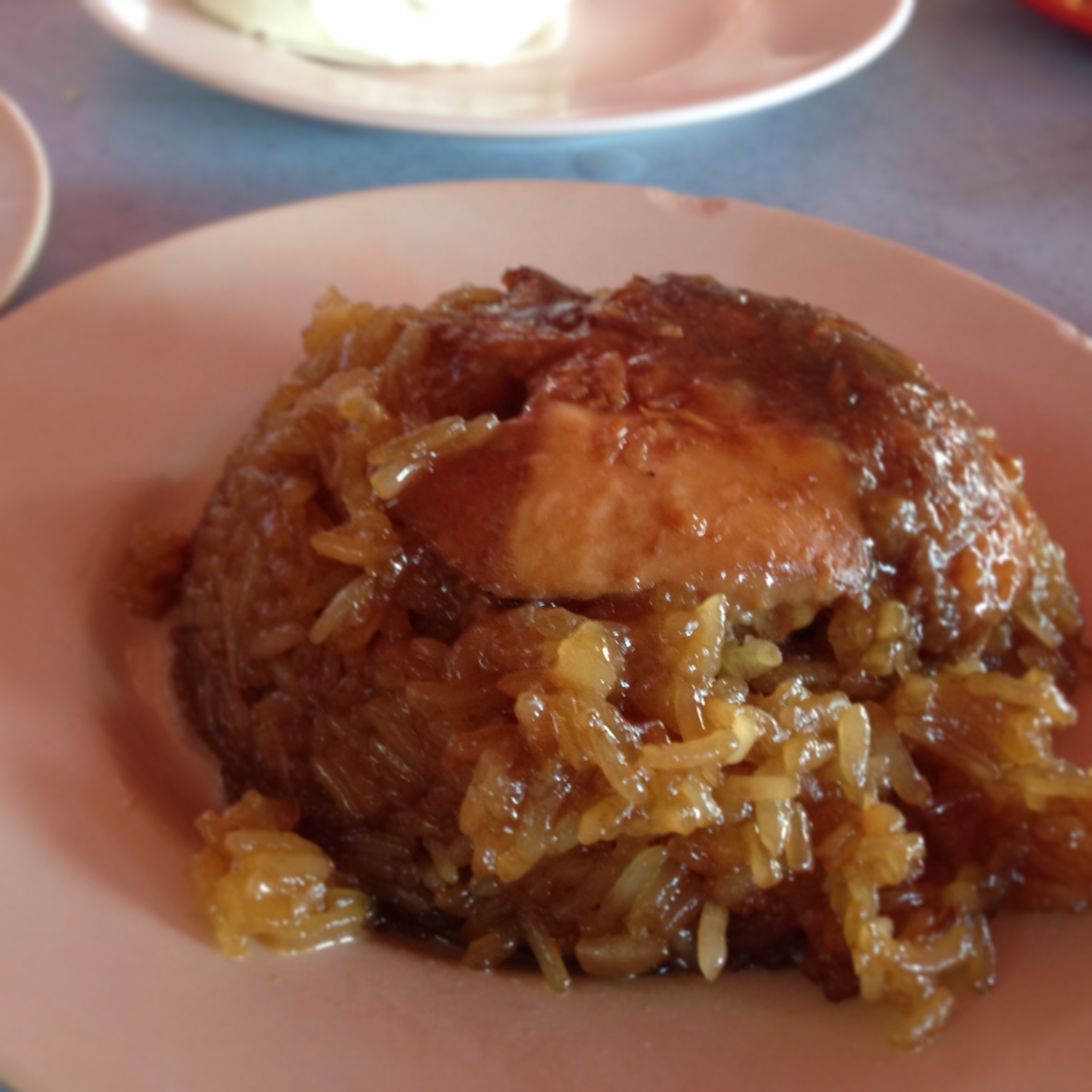 lo mai gai in KL